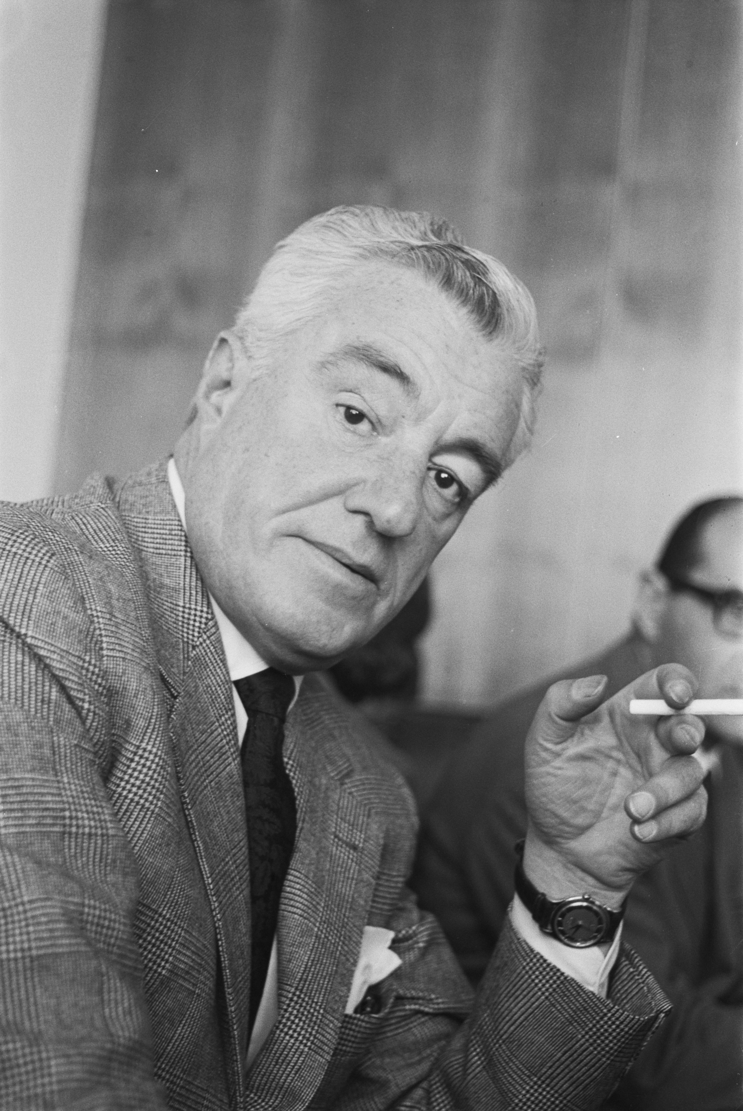 Collectie / Archief : Fotocollectie Anefo Reportage / Serie : [ onbekend ] Beschrijving : Vittorio de Sica op Schiphol (Londen-Rome) koopt souvenirs Datum : 22 maart 1962 Locatie : Noord-Holland, Schiphol Trefwoorden : SOUVENIRS Fotograaf : Pot, Harry / Anefo Auteursrechthebbende : Nationaal Archief Materiaalsoort : Negatief (zwart/wit) Nummer archiefinventaris : bekijk toegang 2.24.01.05 Bestanddeelnummer : 913-6783